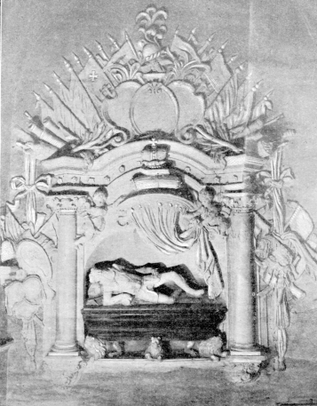 Надгробок князя Костянтина Острозького в Успенському соборі Києво-Печерської лаври.